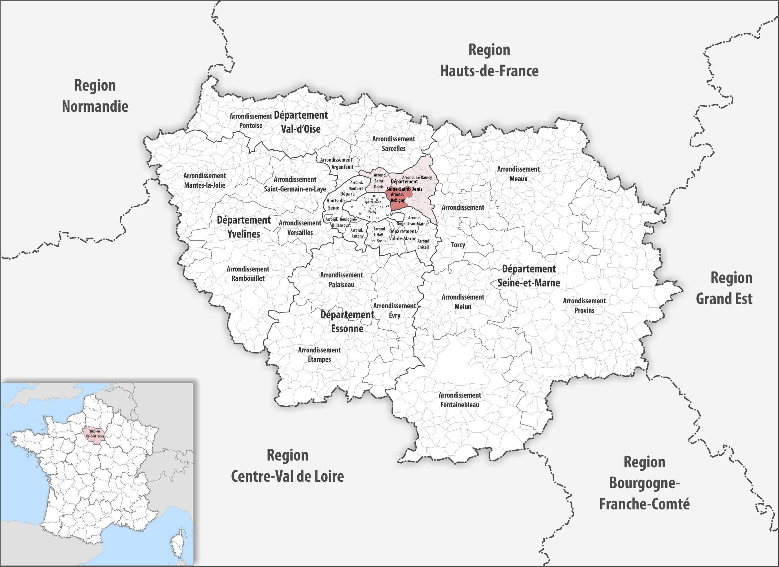 Lage des Arrondissements Bobigny